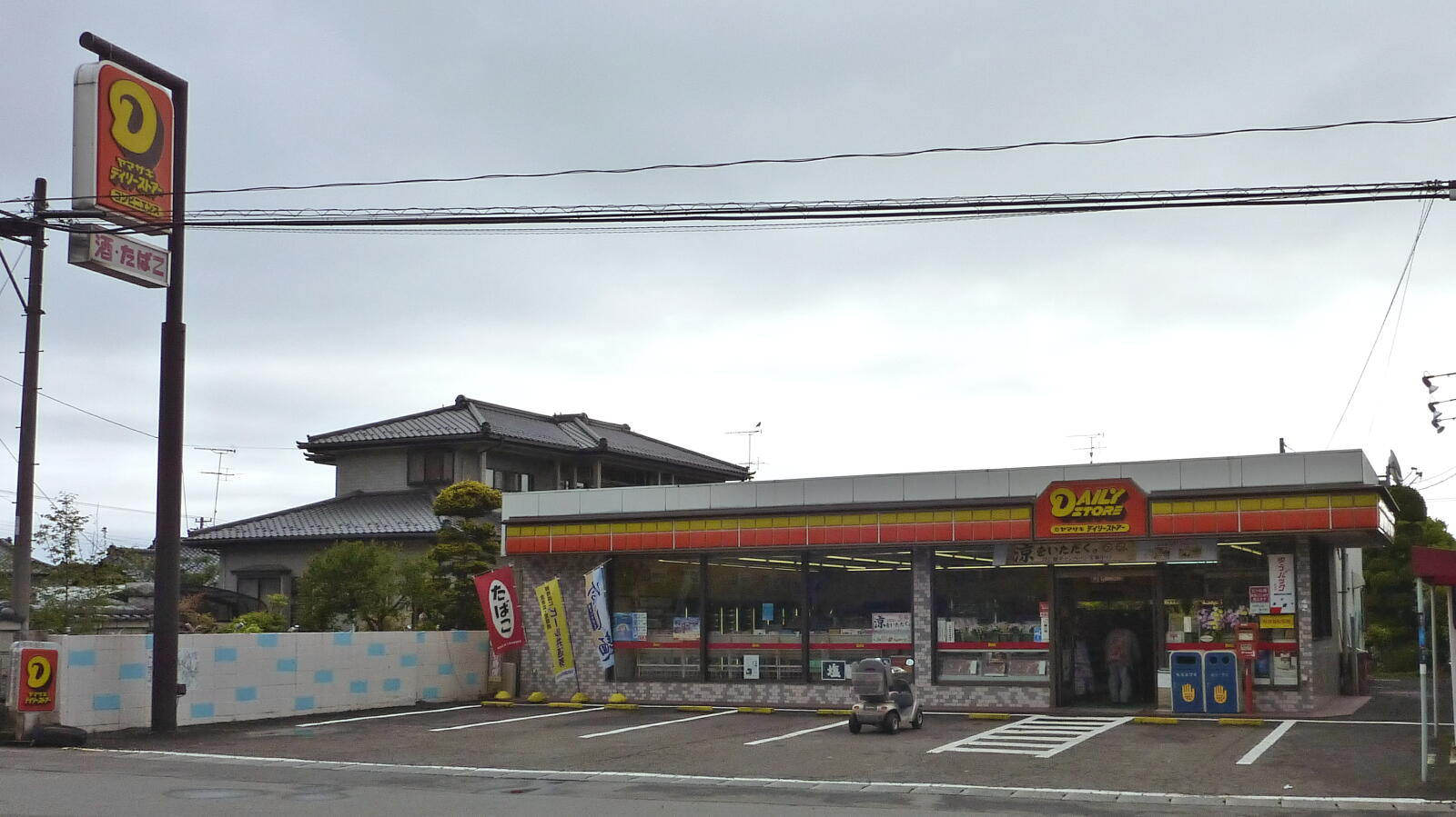 ヤマザキデイリーストア山元町店